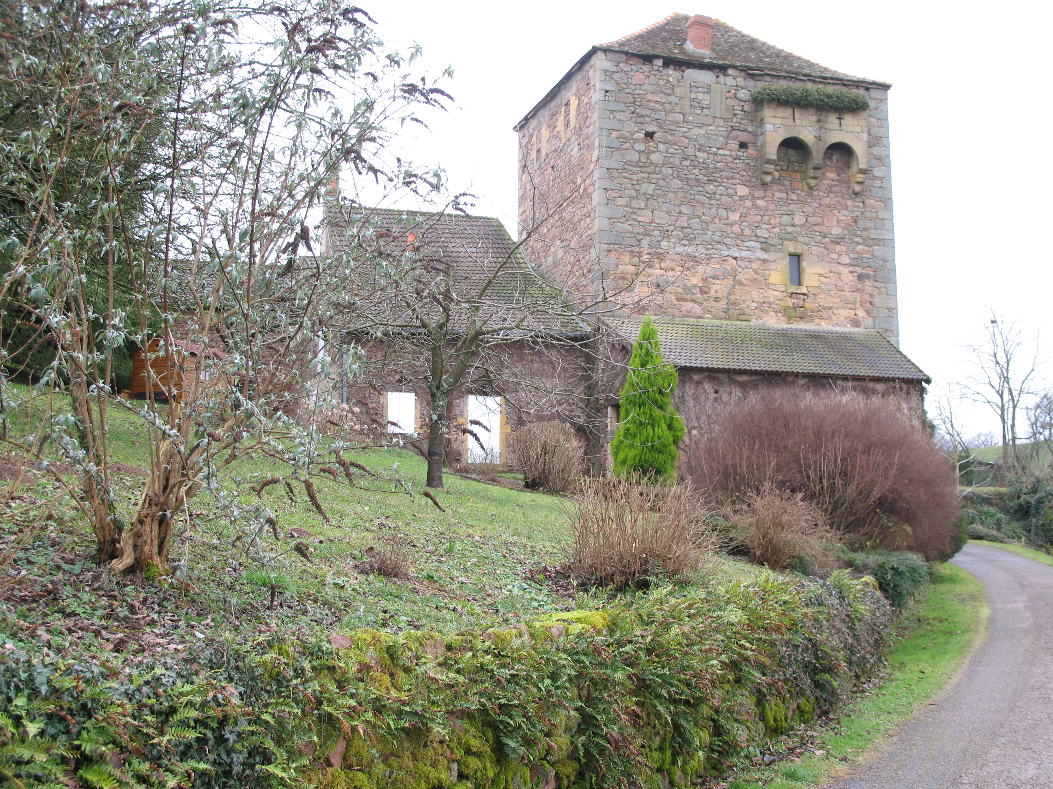 château de Dyo et jardin (Saône-et-Loire)